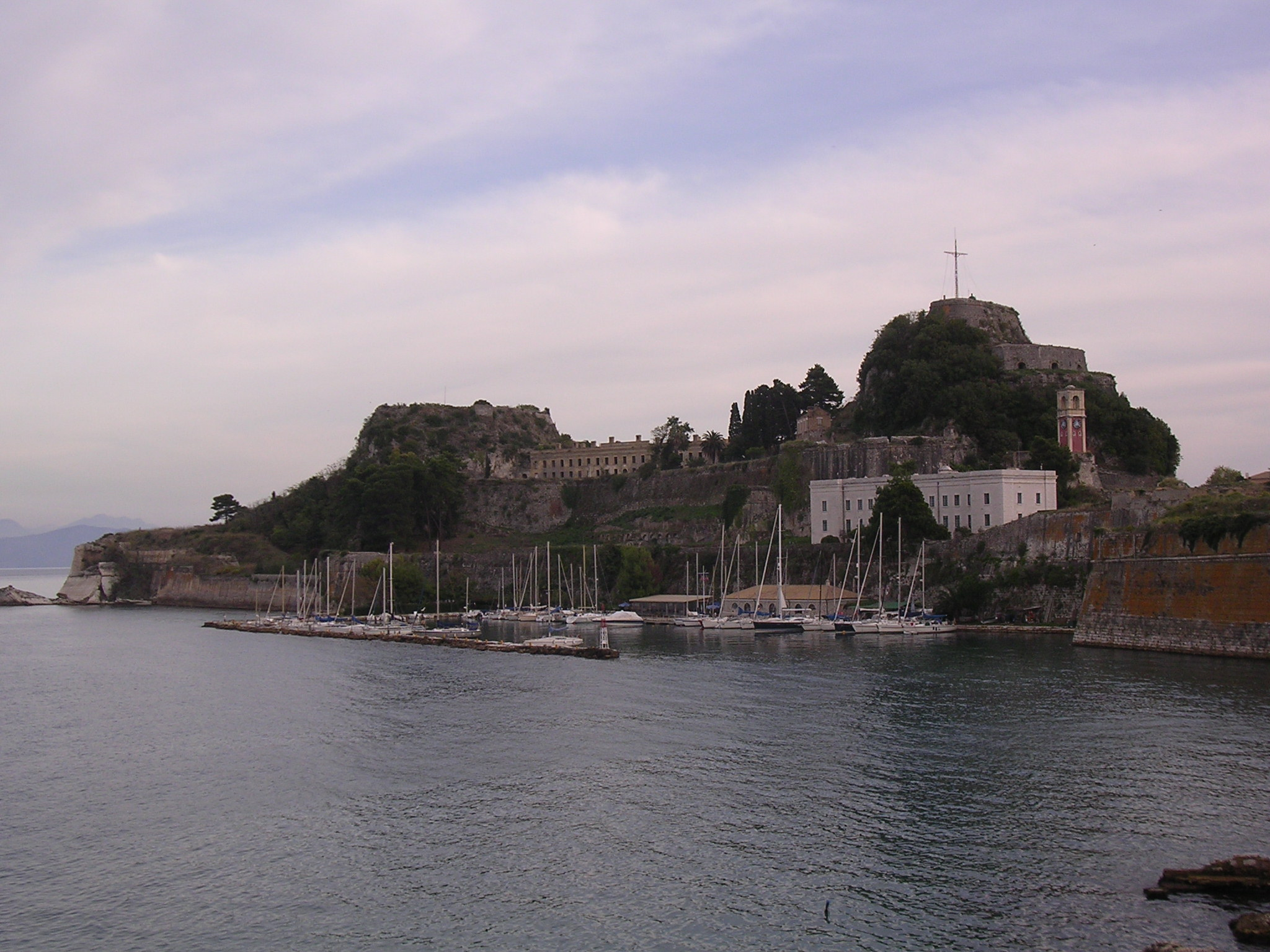 Παλιό Φρούριο Κέρκυρας από τον Κήπο του Λαού.